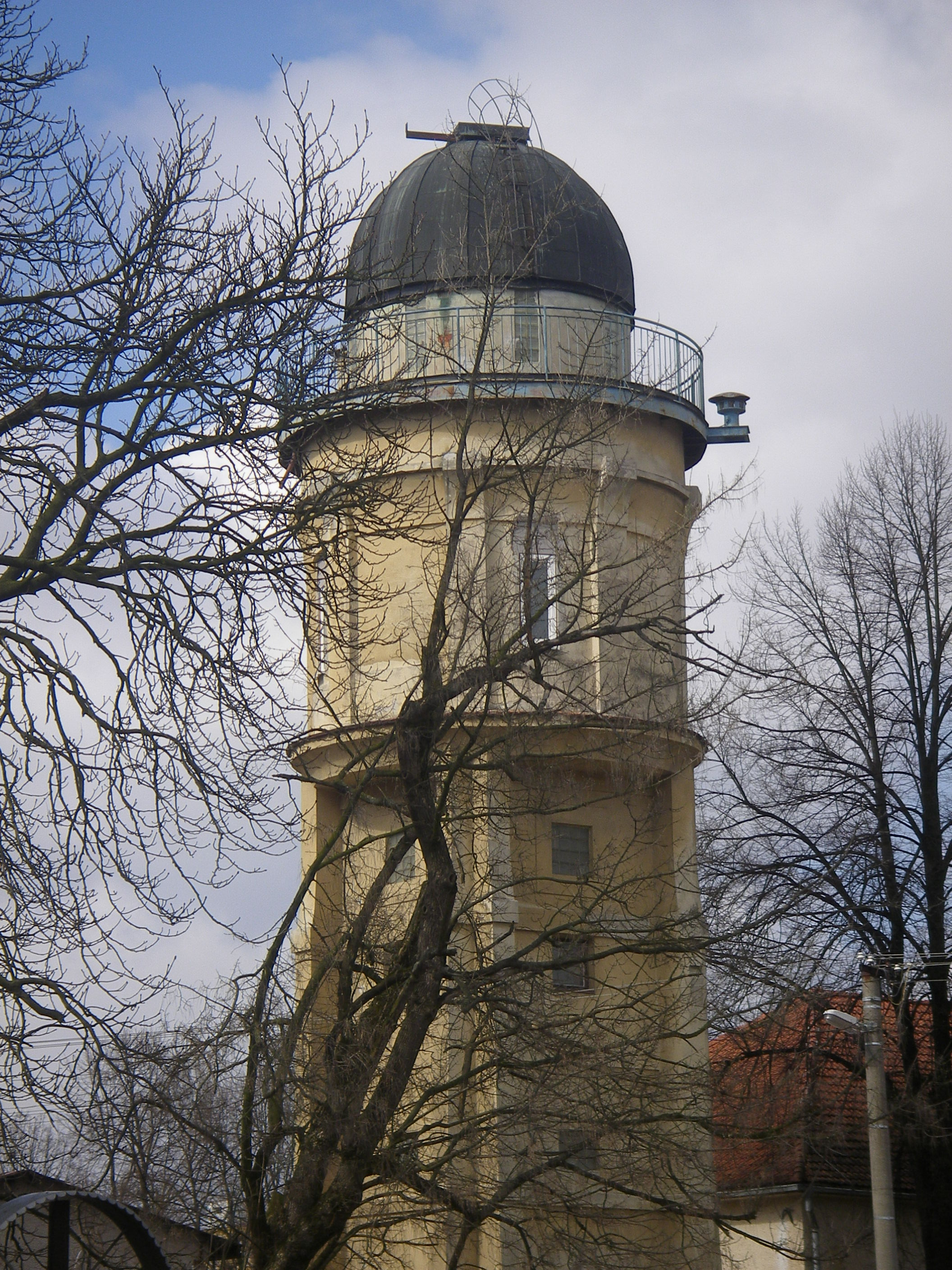 Stará hvezdáreň, predtým hasičská vodáreň